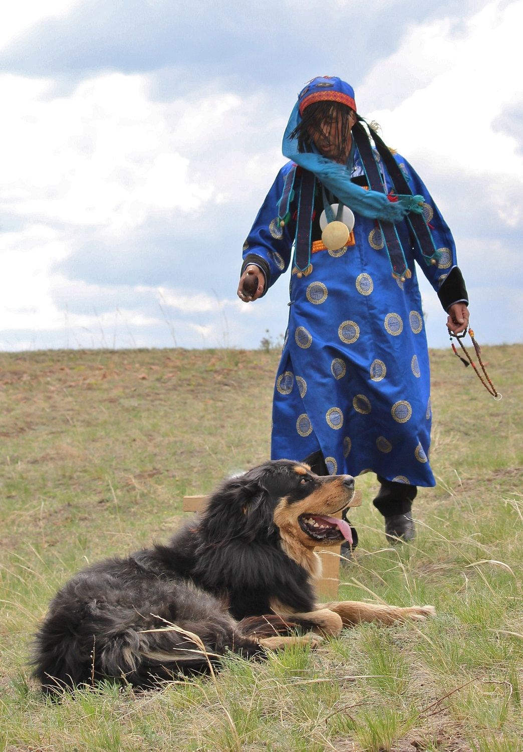 Хотошо - собака хунну. Шаманский обряд на Иволгинском городище.